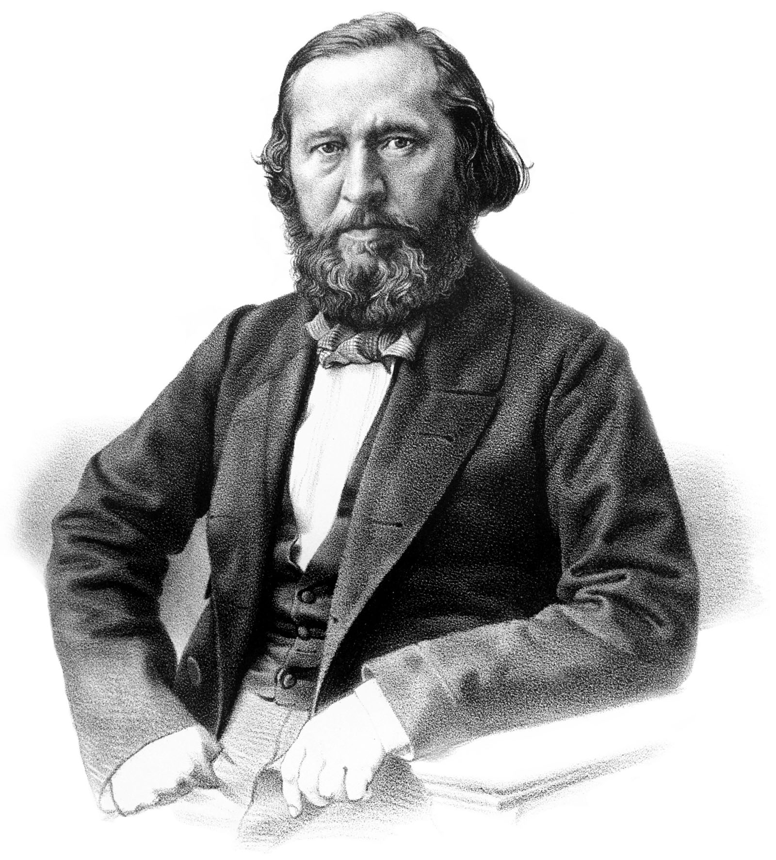 C. AKSAKOV. Съ Фотографии Бергнера. Лит. А. Мюнстера, СПБ. Imp. Lith. A. Munster (Editeur)